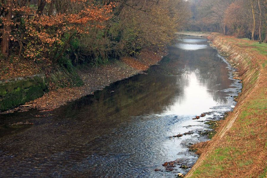 Il Naviglio Langosco nel comune di Romentino durante la stagione autunnale.